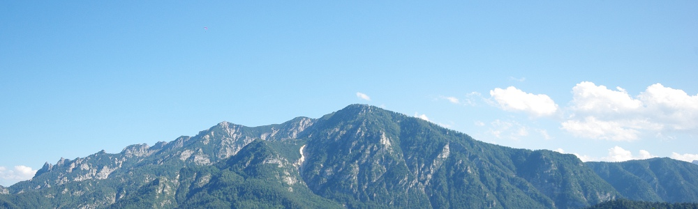 Lattengebirge, von der Padinger Alm aus gesehen (Nonn)